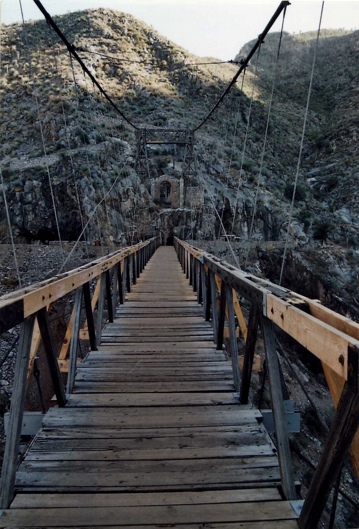 Imagen tomada sobre el Puente La Ojuela en Mapimí, Durango, México.